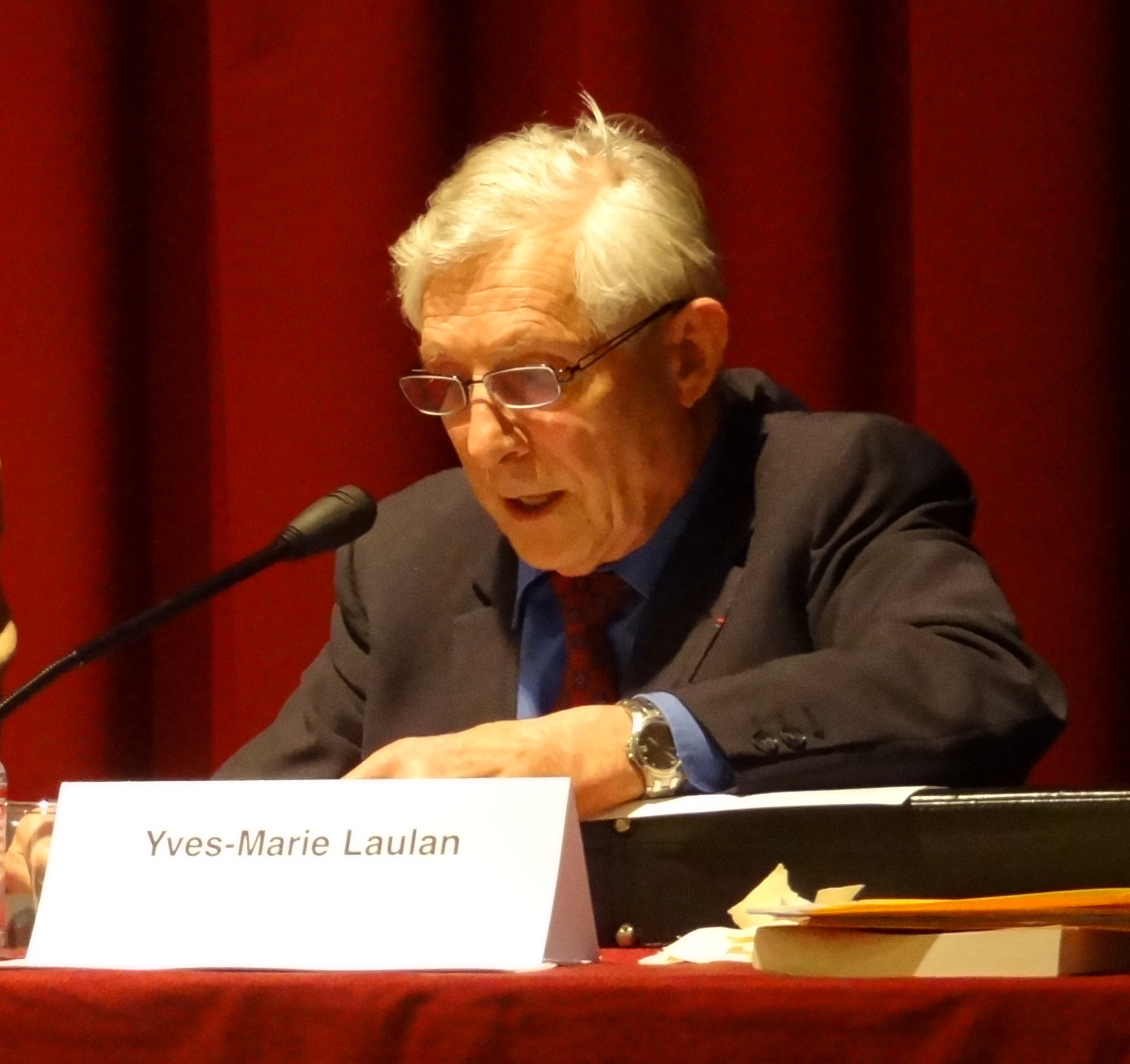 Paris - 16 février 2012 - Colloque : peut-on raisonnablement estimer les coûts de l'immigration et de l'intégration ?